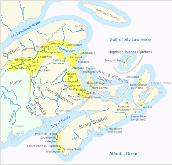 Acadia 2012